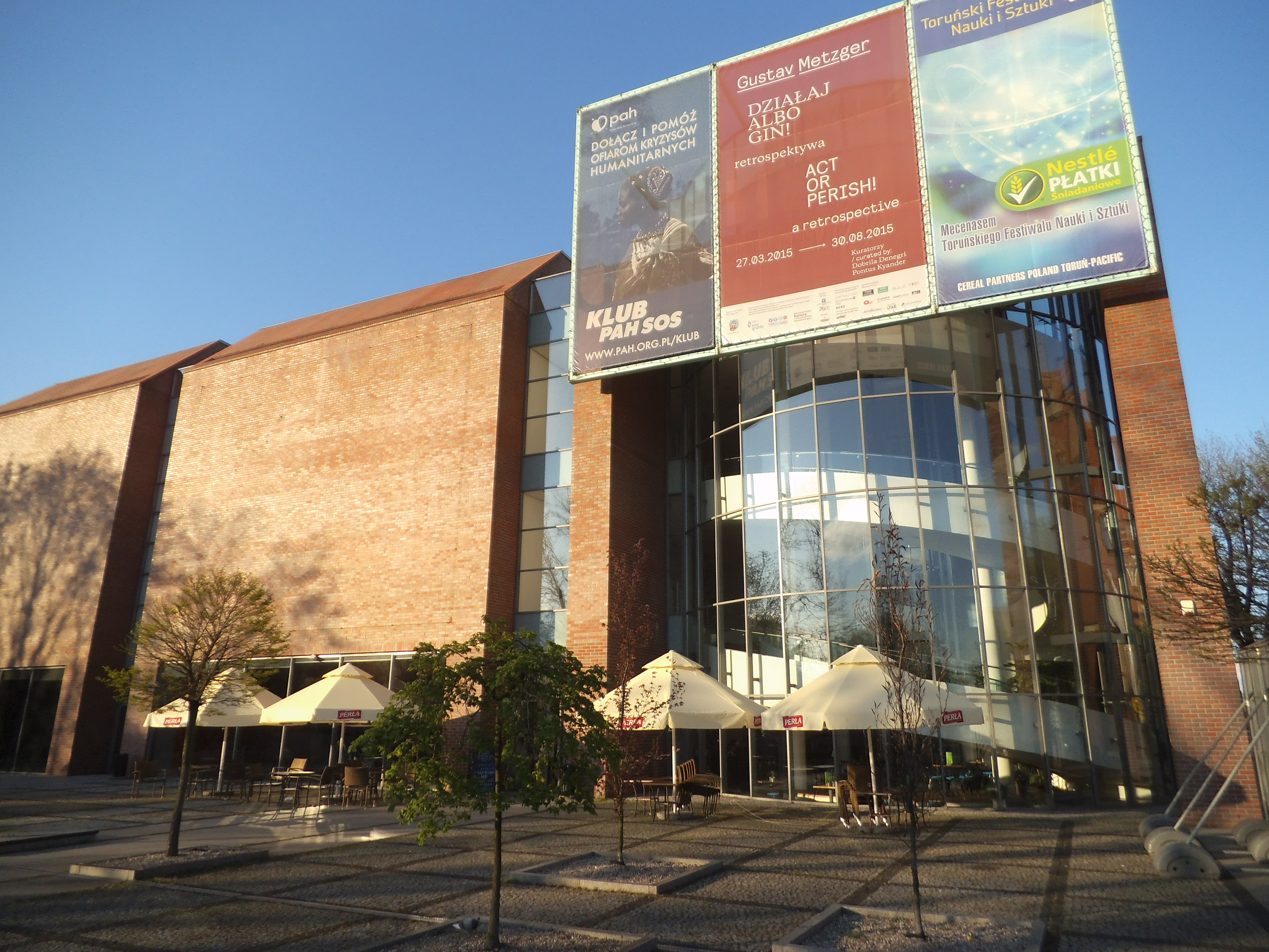 CSW Toruń